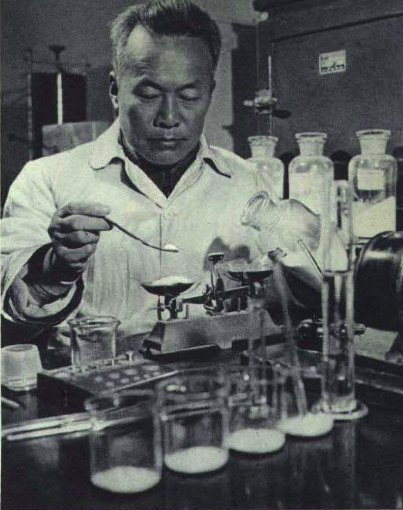 蔡旭，中华人民共和国农业学家